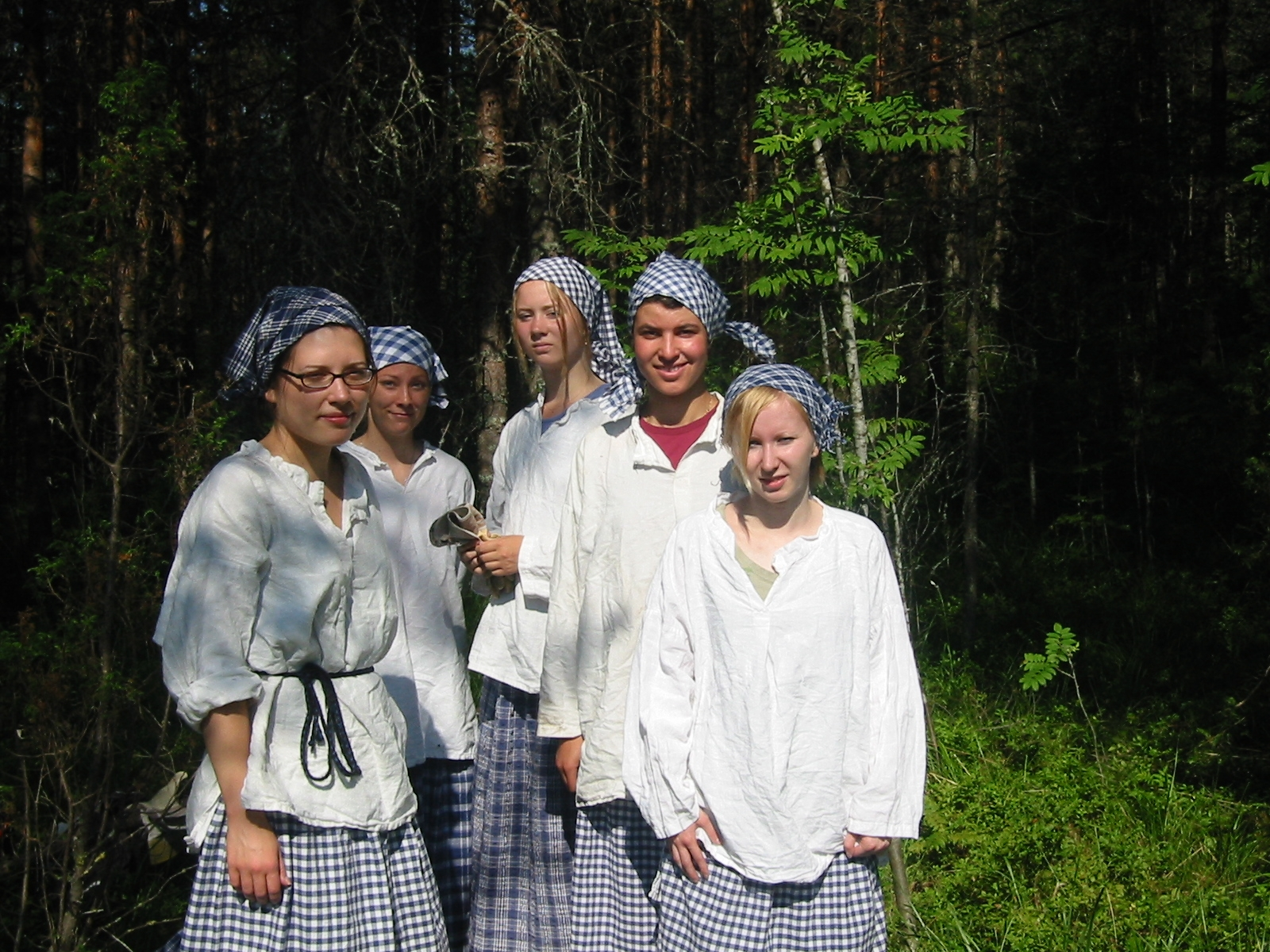 Kaskenpolttajat